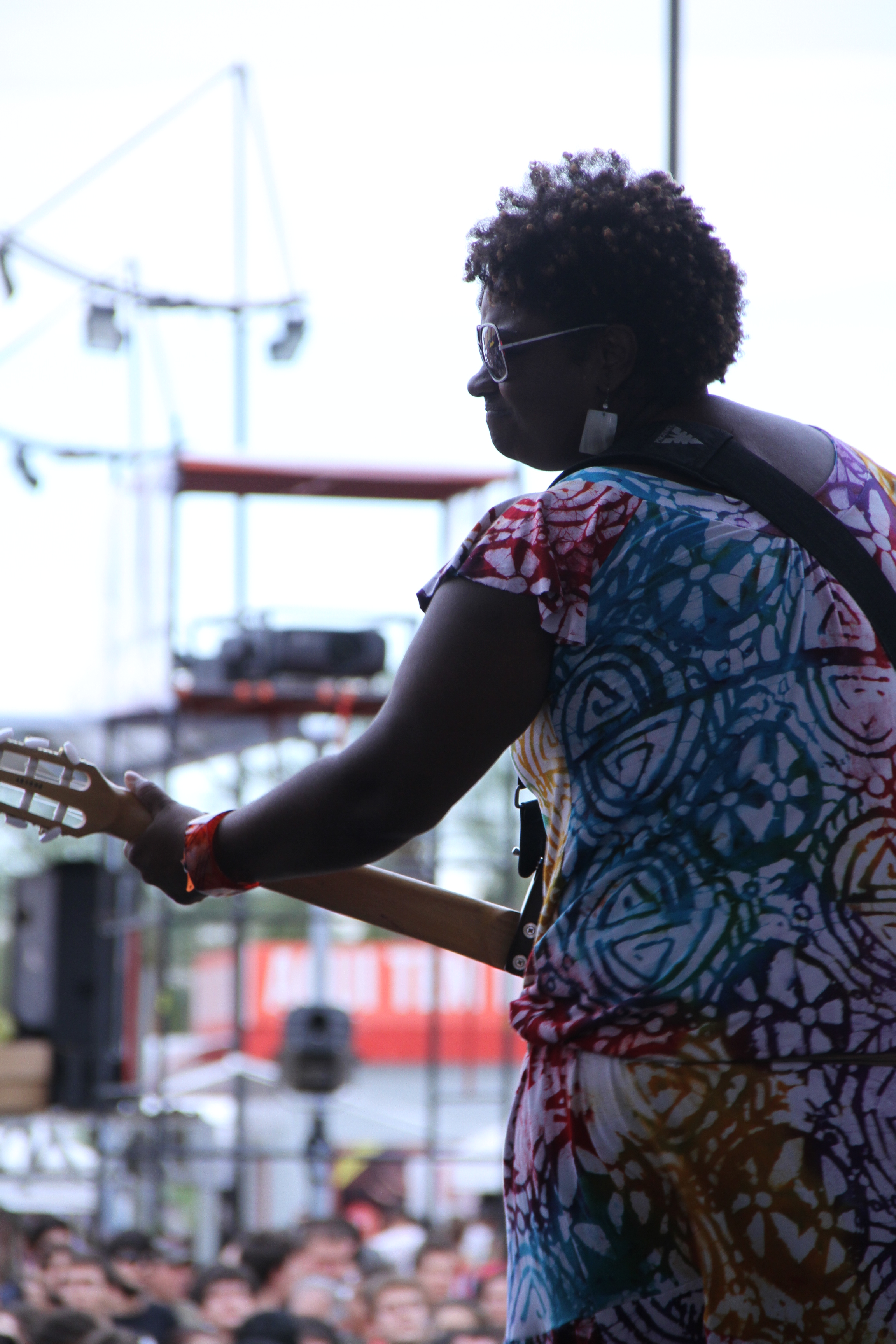 Festival contato de 2011.